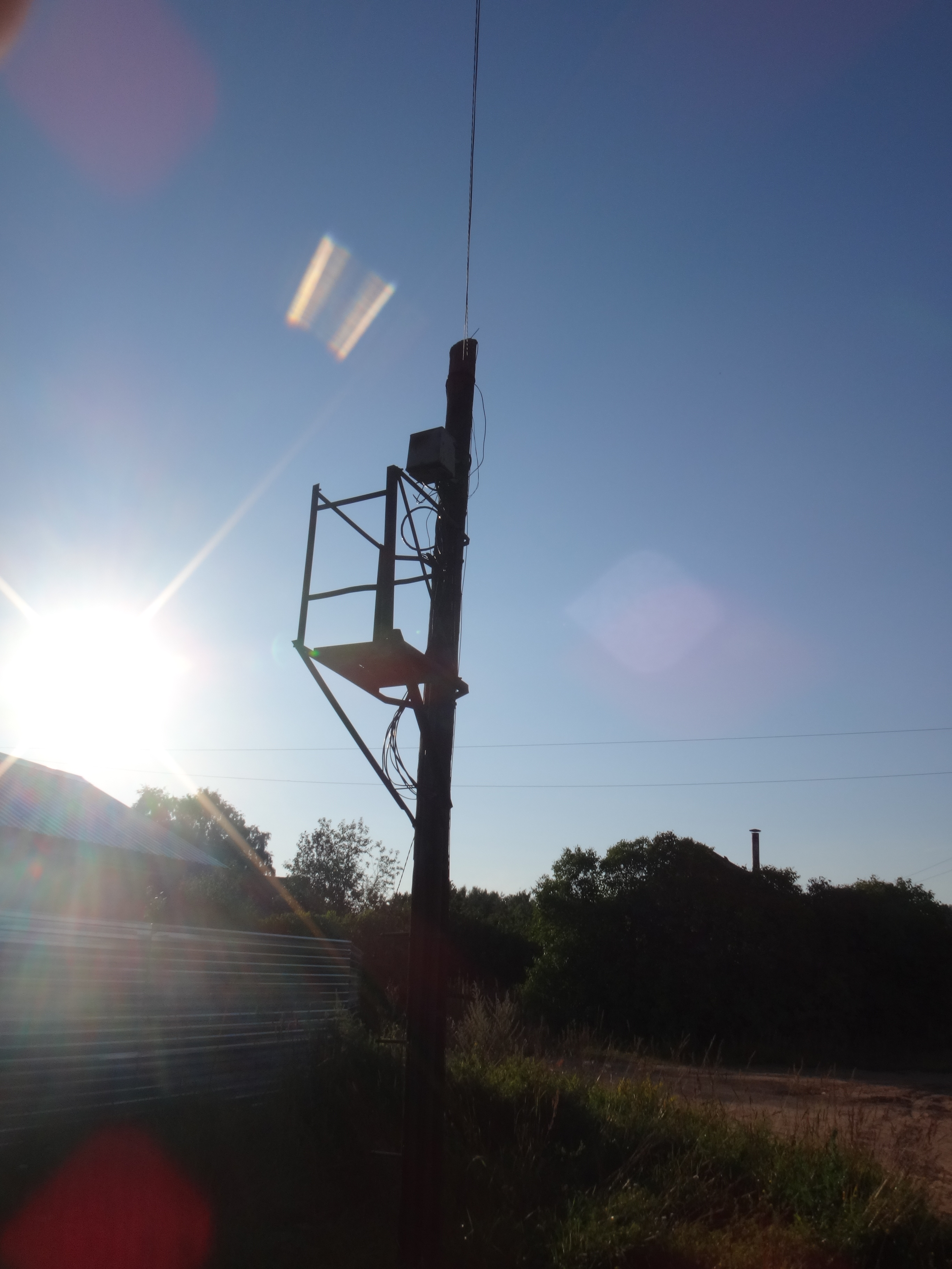 Столбовой телефон